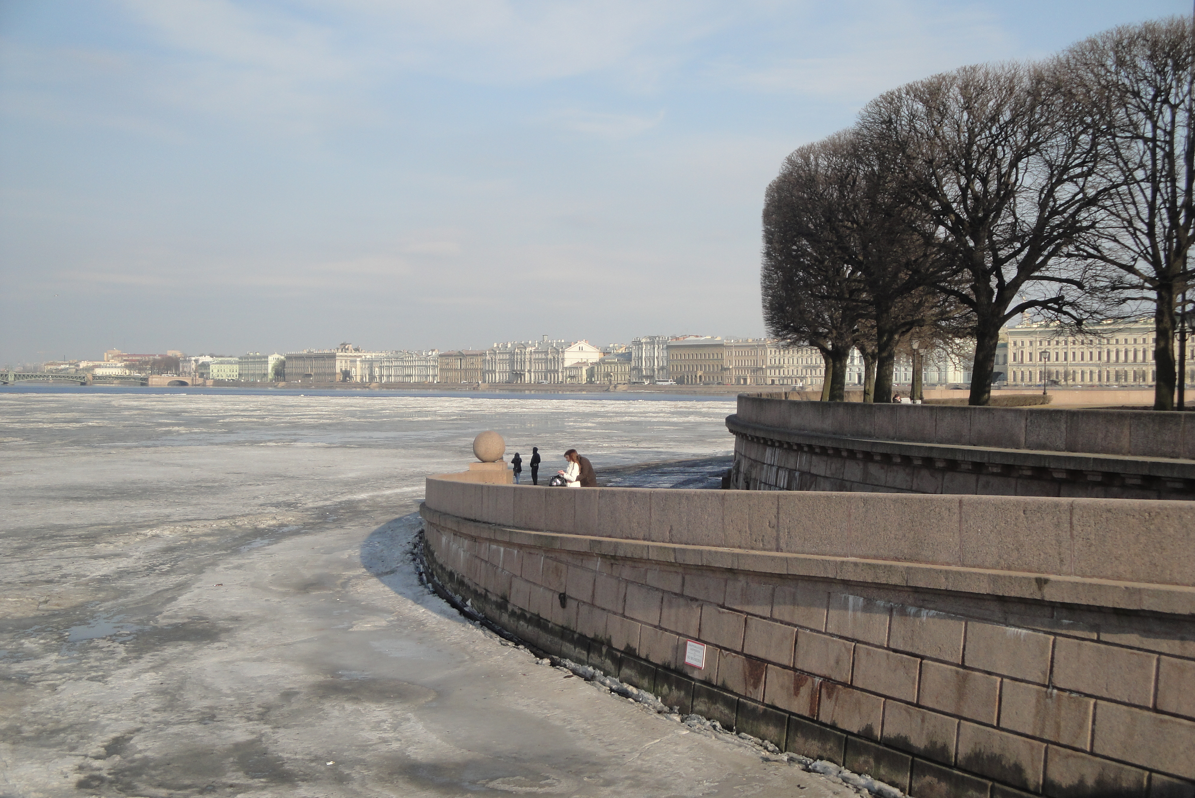 Пристань со спусками-пандусами (Санкт-Петербург, набережная Стрелки Васильевского острова)